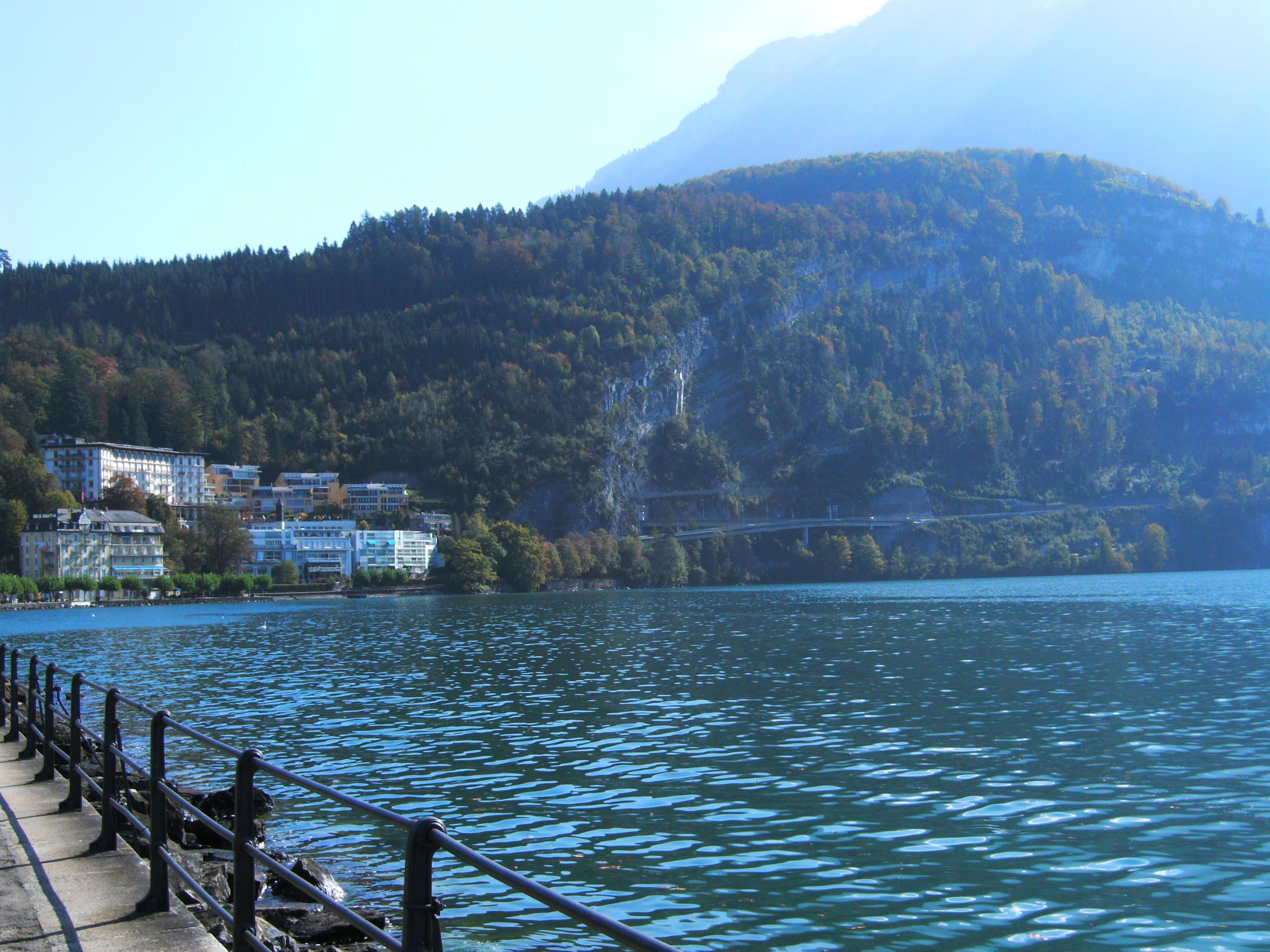 Brunnen, localité sur la commune d'Ingenbohl (canton de Schwytz), au bord du lac des Quatre Cantons. Prise de vue : depuis la Place des Suisses de l'Etranger, en direction du sud-est.